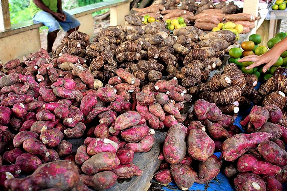 Obst und Gemüse in Gleno